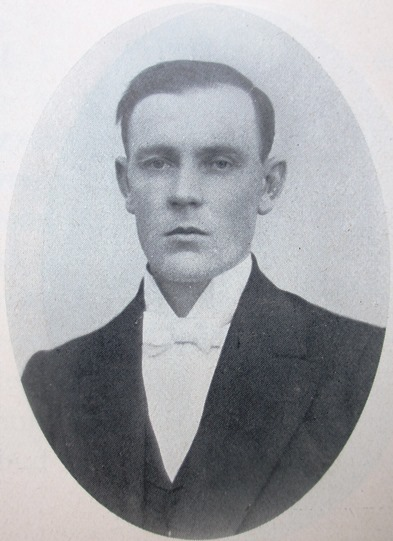 Jonas Nikolaus Svedberg (1881-1954)